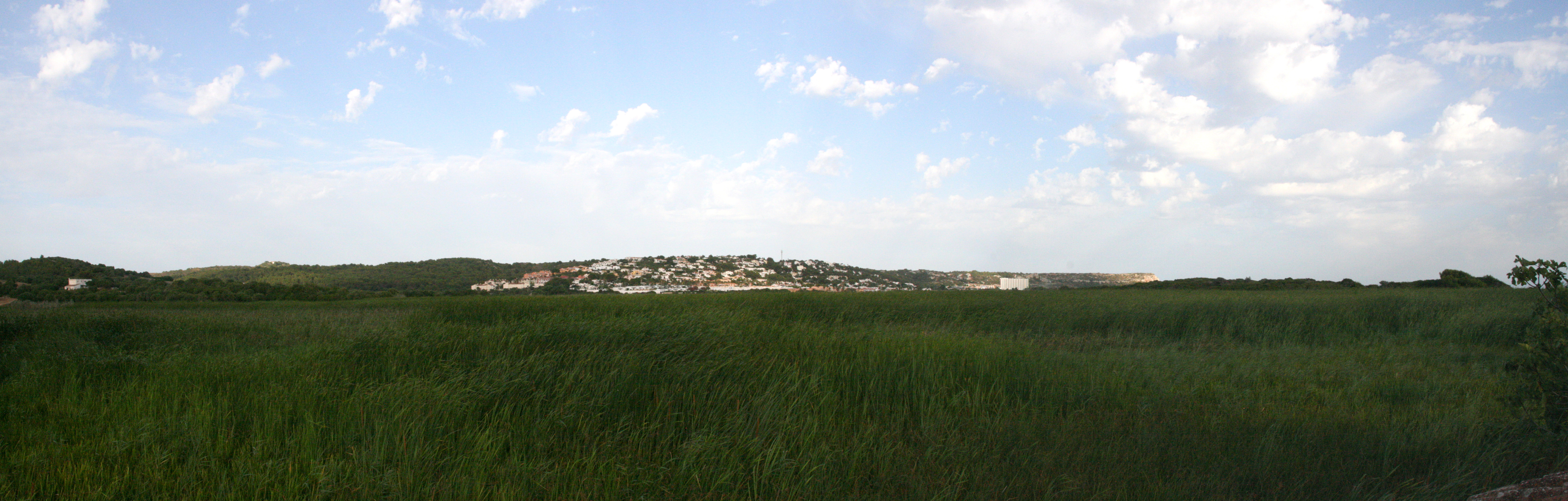 Vista del prat de Son Bou con Sant Jaume Mediterrani y Torre Solí al fondo This is a photography of a Special Area of Conservation in Spain with the ID: ES0000238. Natura2000 entry, EEA entry